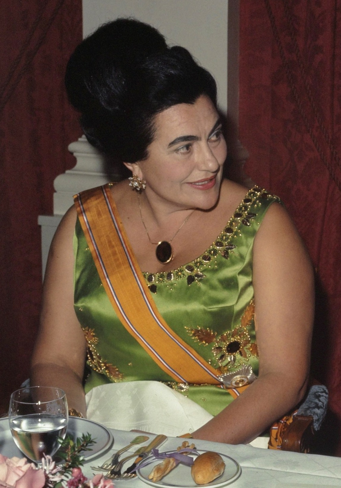 Nederlandse regering biedt President Tito en echtgenote galadiner aan in Amstel Hotel, Amsterdam; mevrouw Broz aan tafel